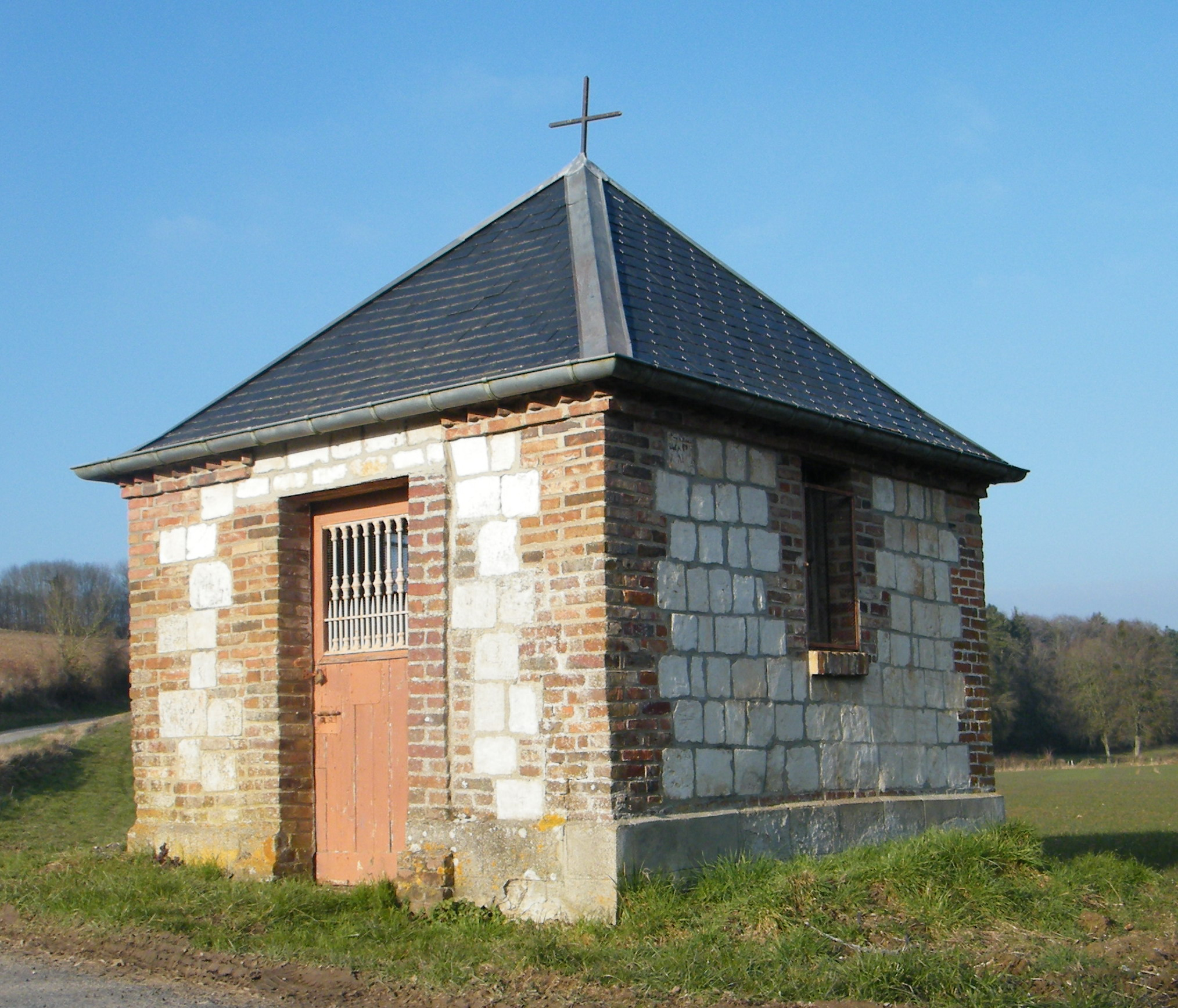 La chapelle Saint-Hubert - Vergies, Somme, France.